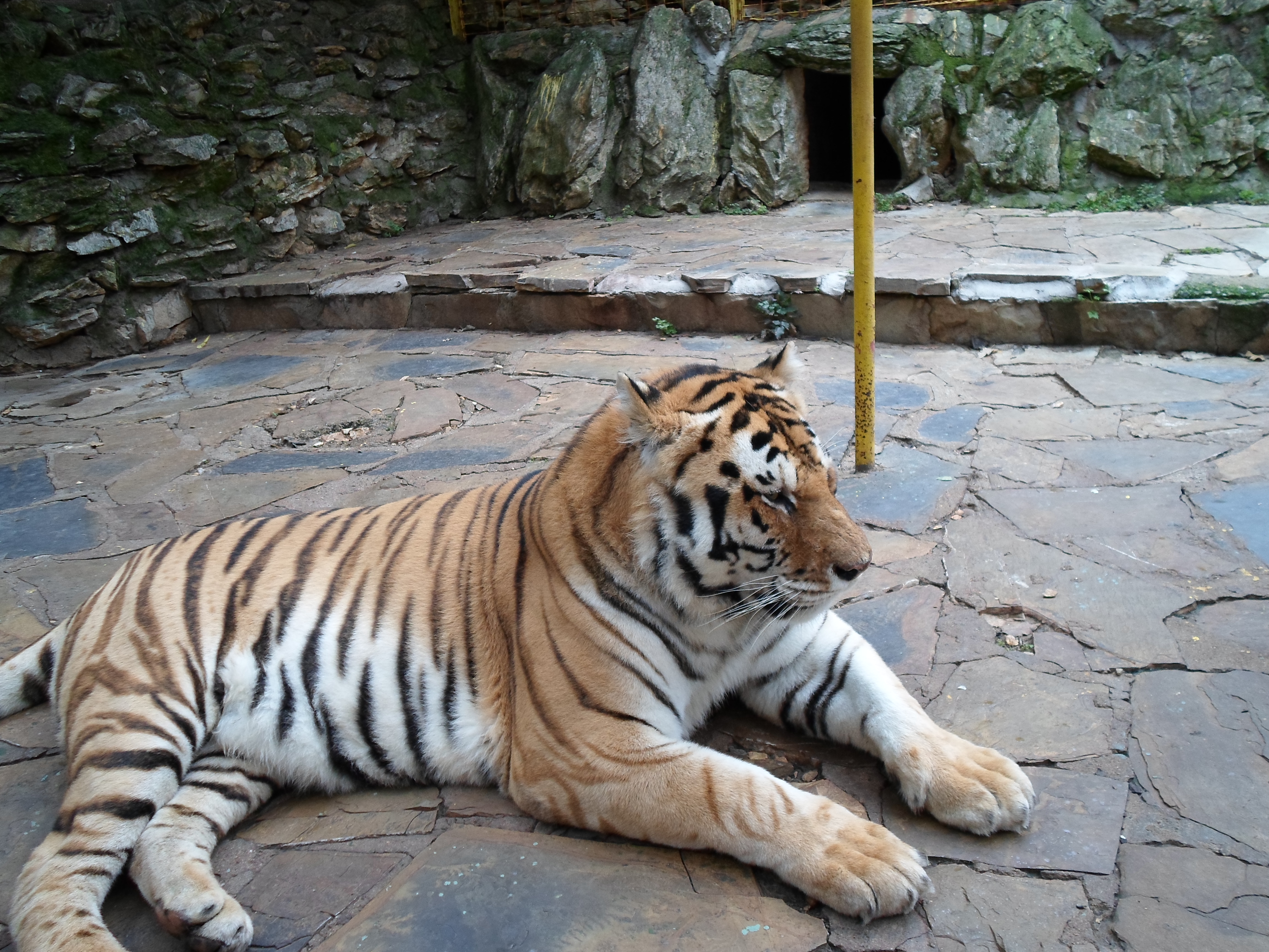 Тигър в зоопарка на Стара Загора, 2015 г.